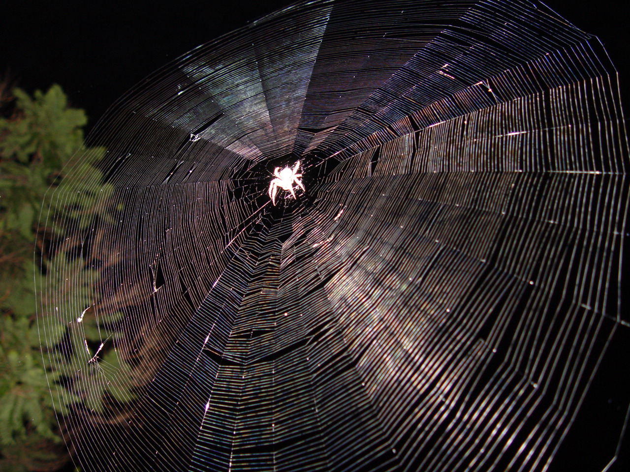 Orb weaver spider web at night